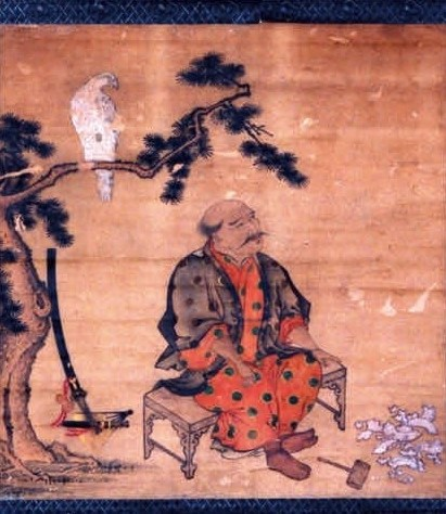 真壁久幹とされる肖像。